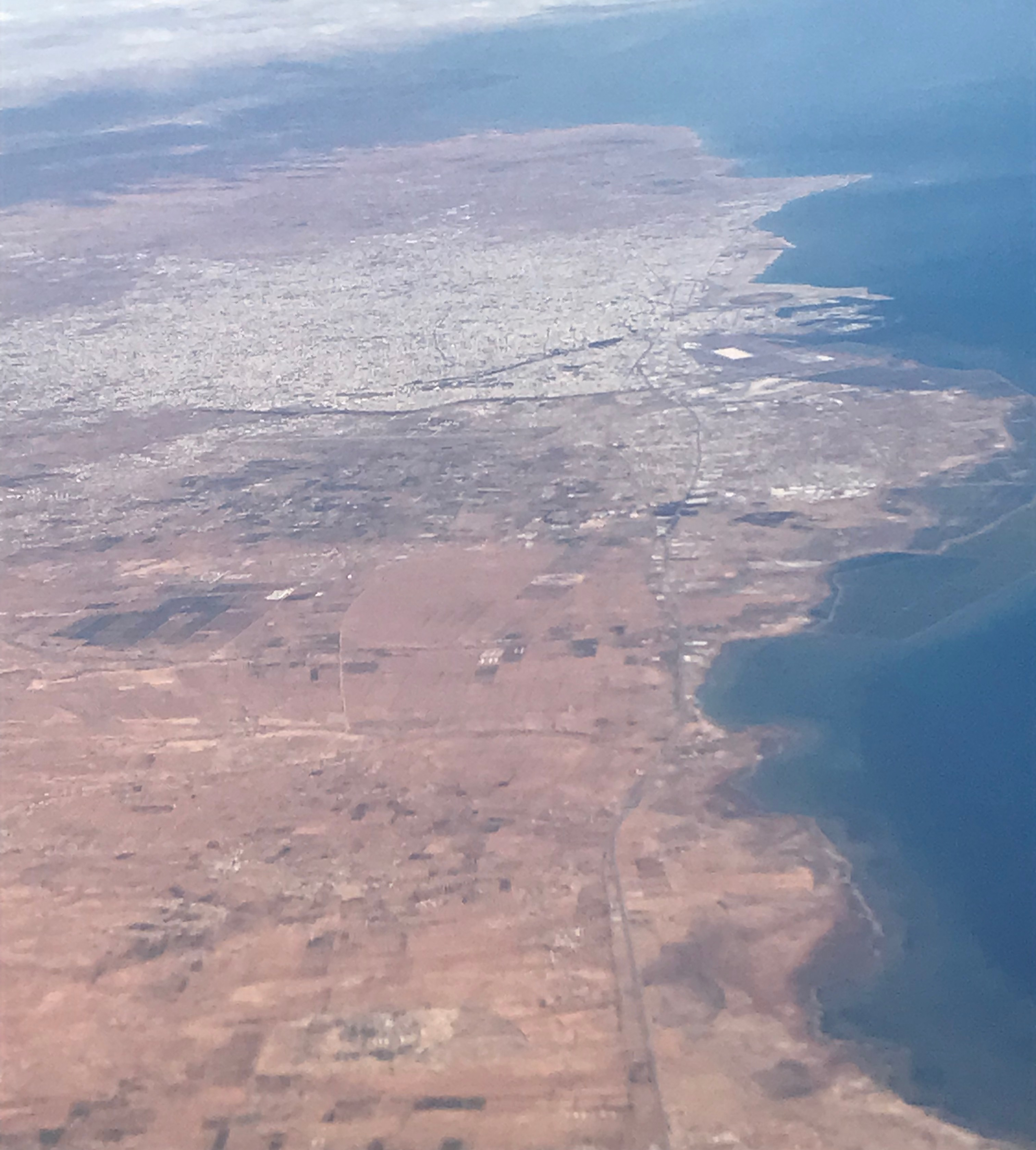 Aerial view of Sfax (Sfax Governorate).